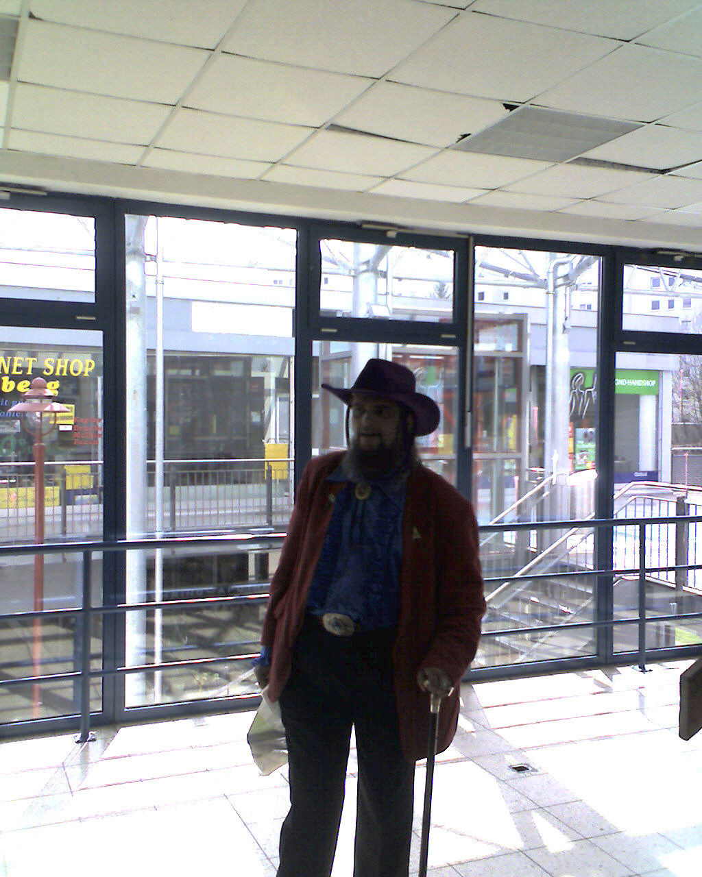 Werner Kurt Giesa auf dem Marburgcon 2006